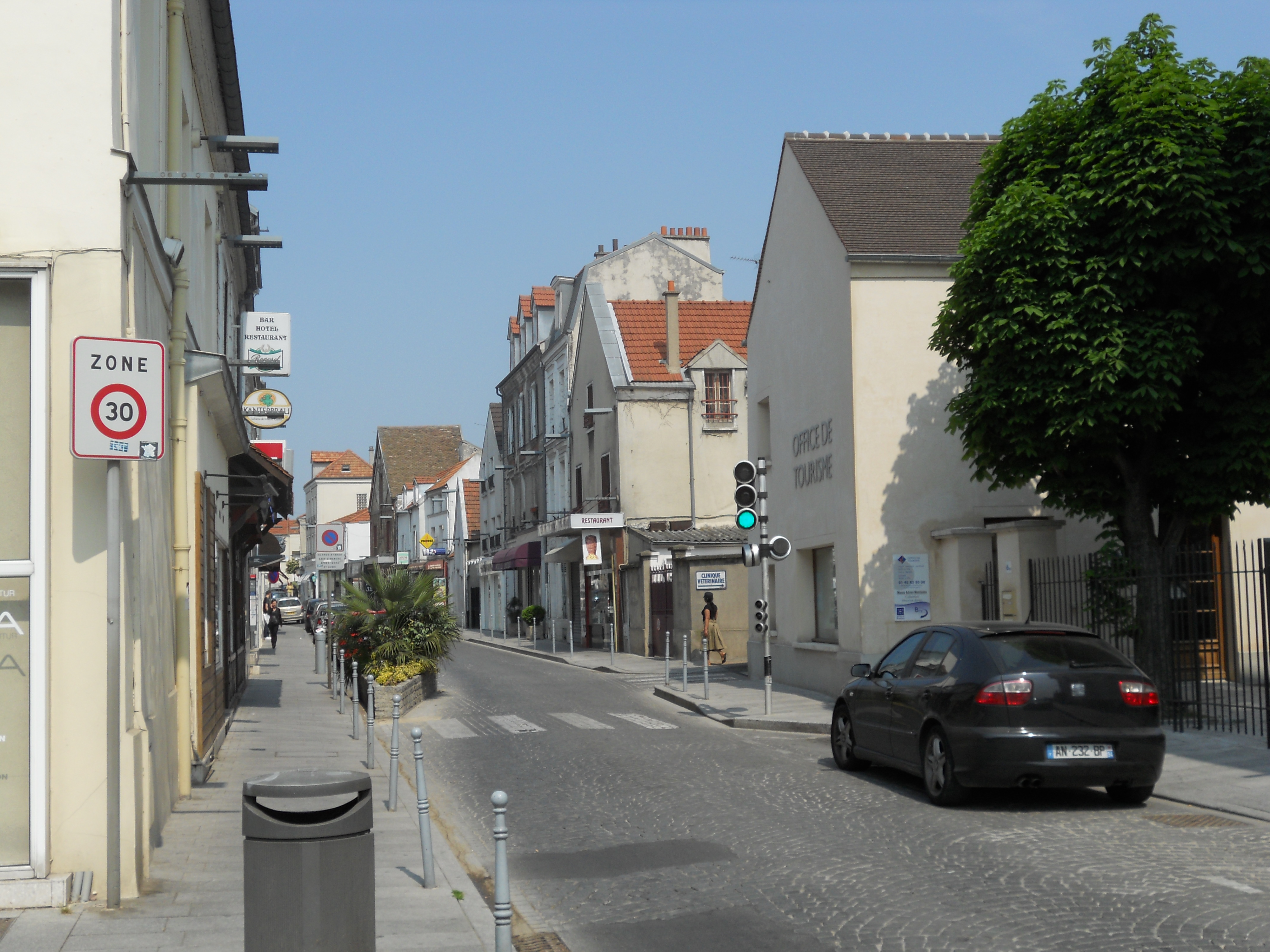 Bry-sur-Marne (France), grande rue. Bry-sur-Marne (France), main street.